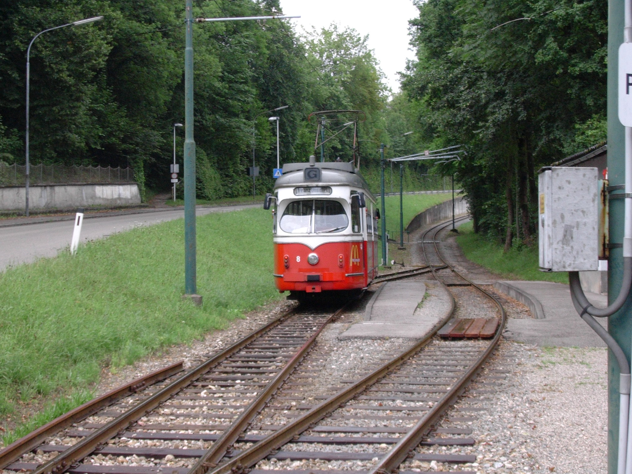 GM 8 - H Tennisplatz